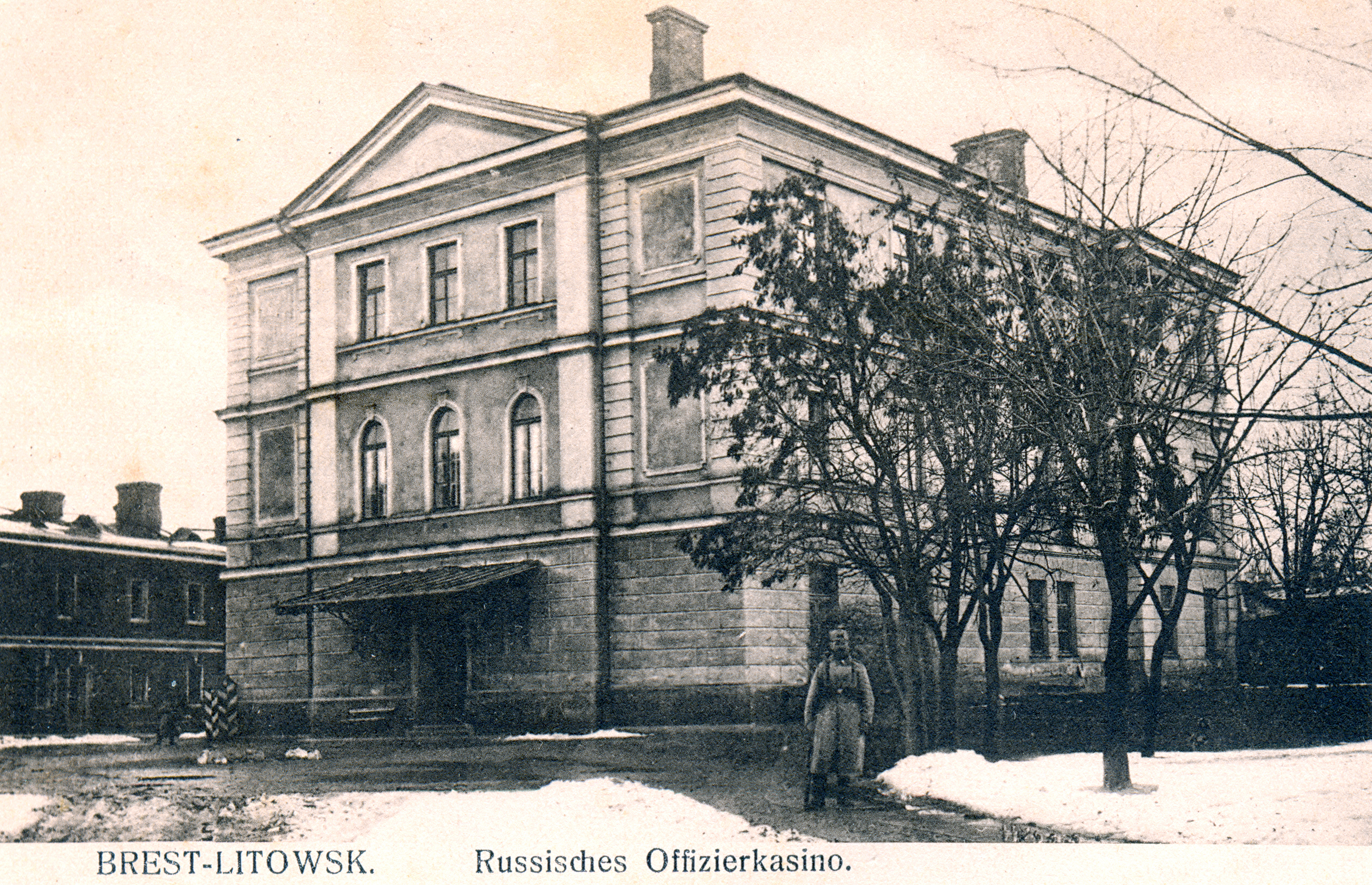 Беларуская (тарашкевіца): Берасьце (Bieraście), вуліца Базылянская (vulica Bazylanskaja). Царква Сьвятых Апосталаў Пятра і Паўла па руйнаваньні расейскімі ўладамі